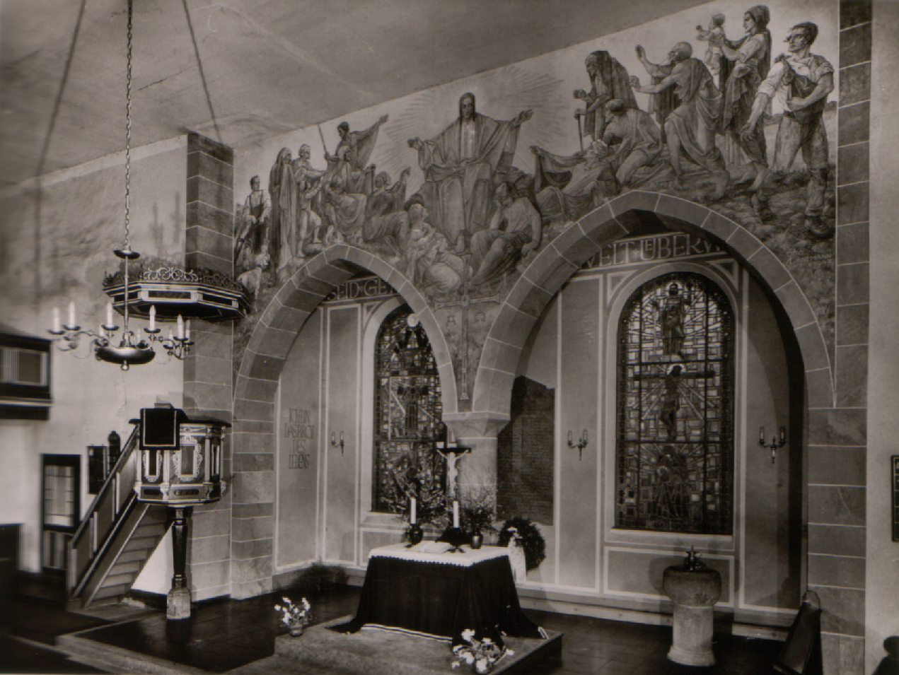 Kreuzkirche, Innenansicht nach Südosten, vor 1947